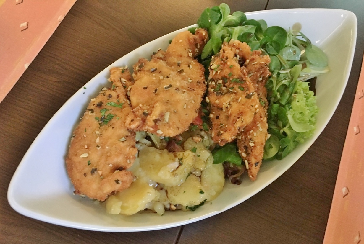 Steirischer Backhendlsalat mit Erdäpfel- und Vogerlsalat, Gasthaus Zur Steirischen Botschaft, 2017